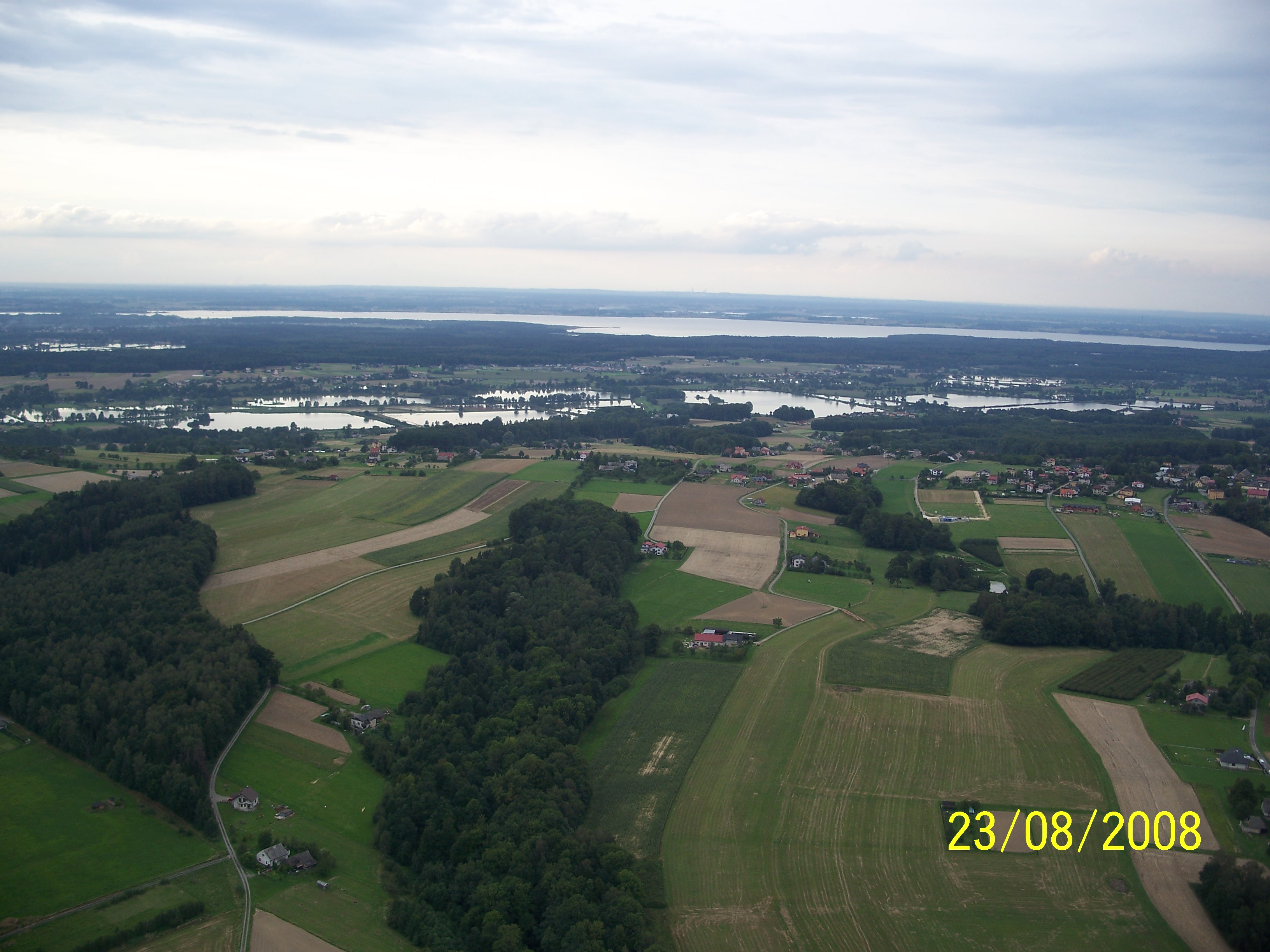 Fragment Doliny Górnej Wisły. Miejscowości gminy Jasienica, Zbiornik Goczałkowicki, oraz liczne stawy.